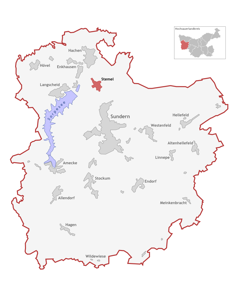 Lage des Ortsteils Stemel in der Stadt Sundern